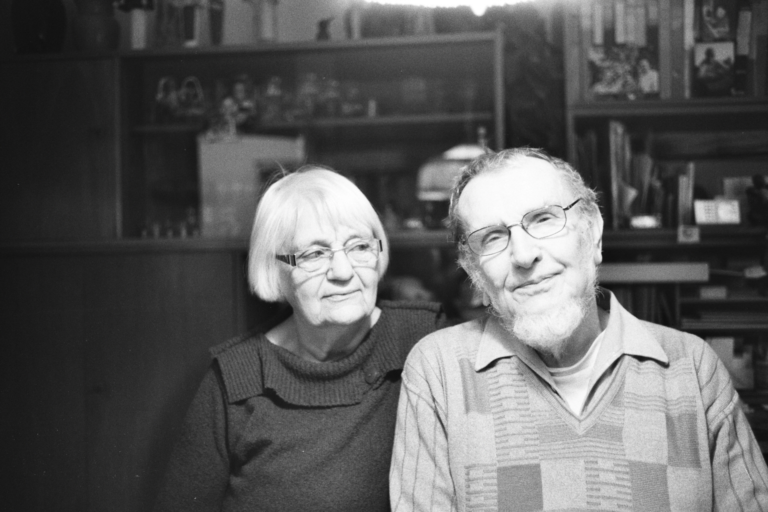 Entstanden bei einem Besuch in der Rößlerschen Wohnung in Moritzburg mit der Leica M6. Fotograf: Jan W. Arnold, Mylau, Vogtland